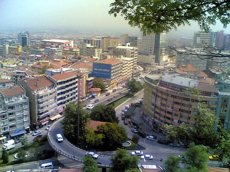 Bursa